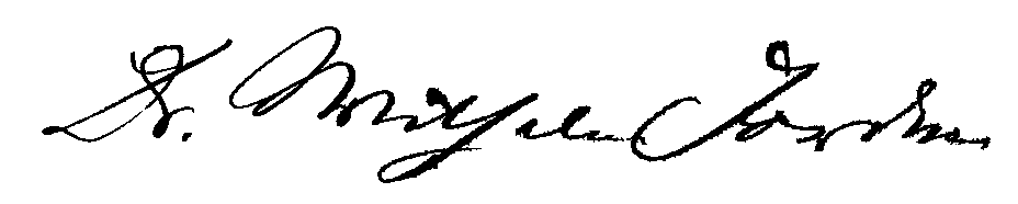 Unterschrift des Schriftstellers und Politikers C.F. Wilhelm Jordan (1819-1904), nicht zu verwechseln mit dem Mathematiker Wilhelm Jordan.